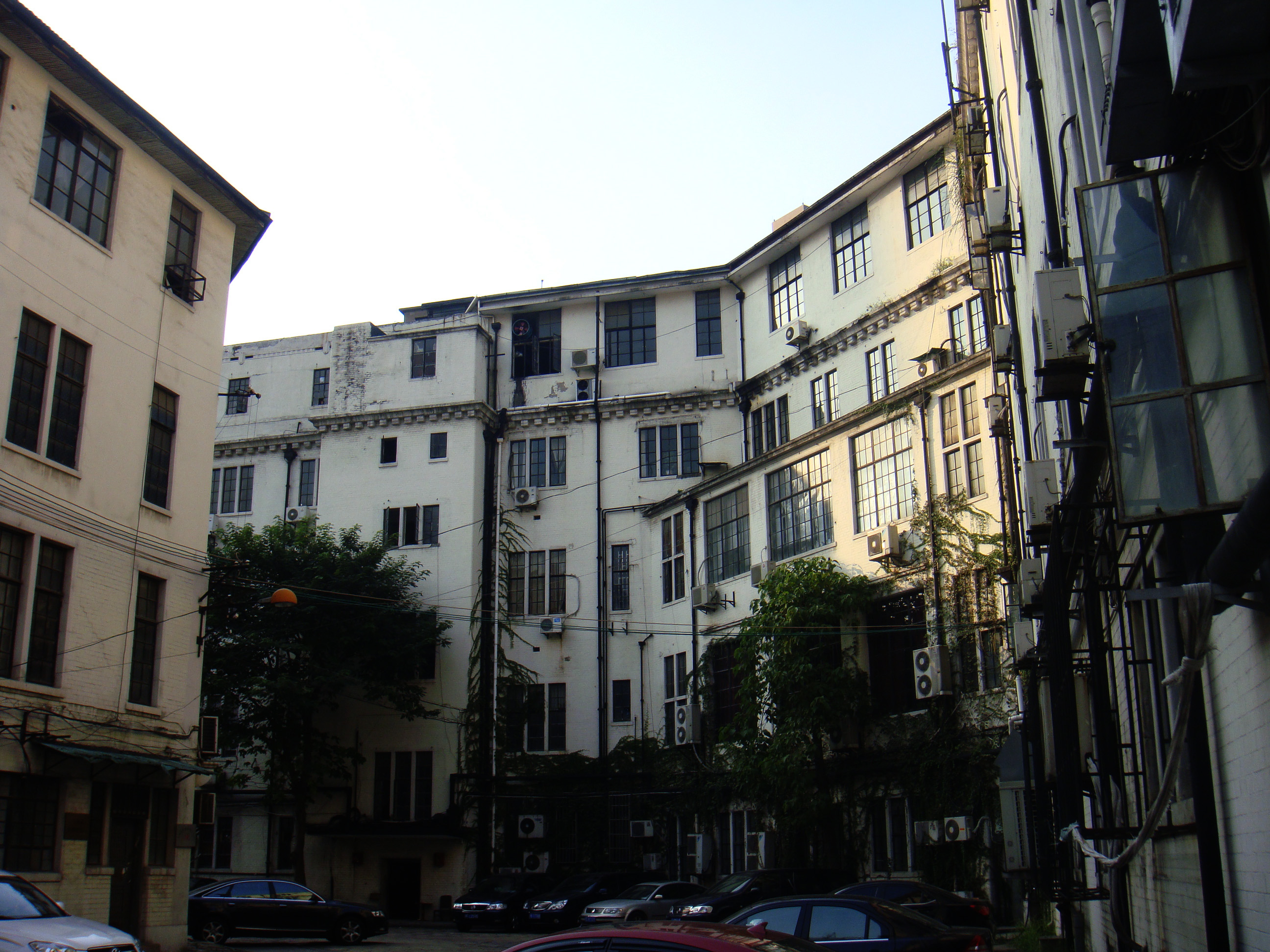 工部局大厦中庭东北角